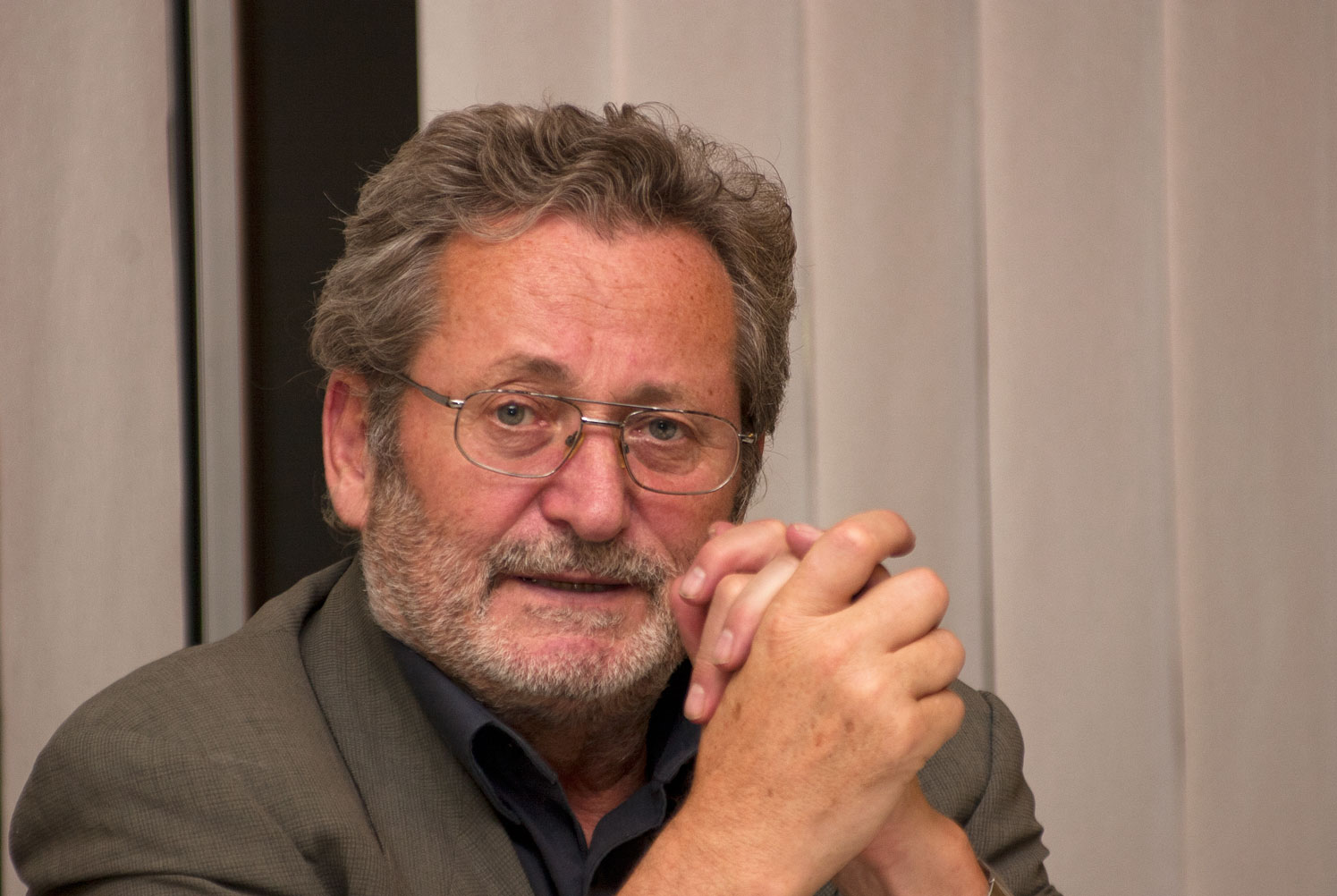 Werner Rügemer (* 4. September 1941 in Amberg) ist ein deutscher Publizist, Referent und Sachbuchautor.